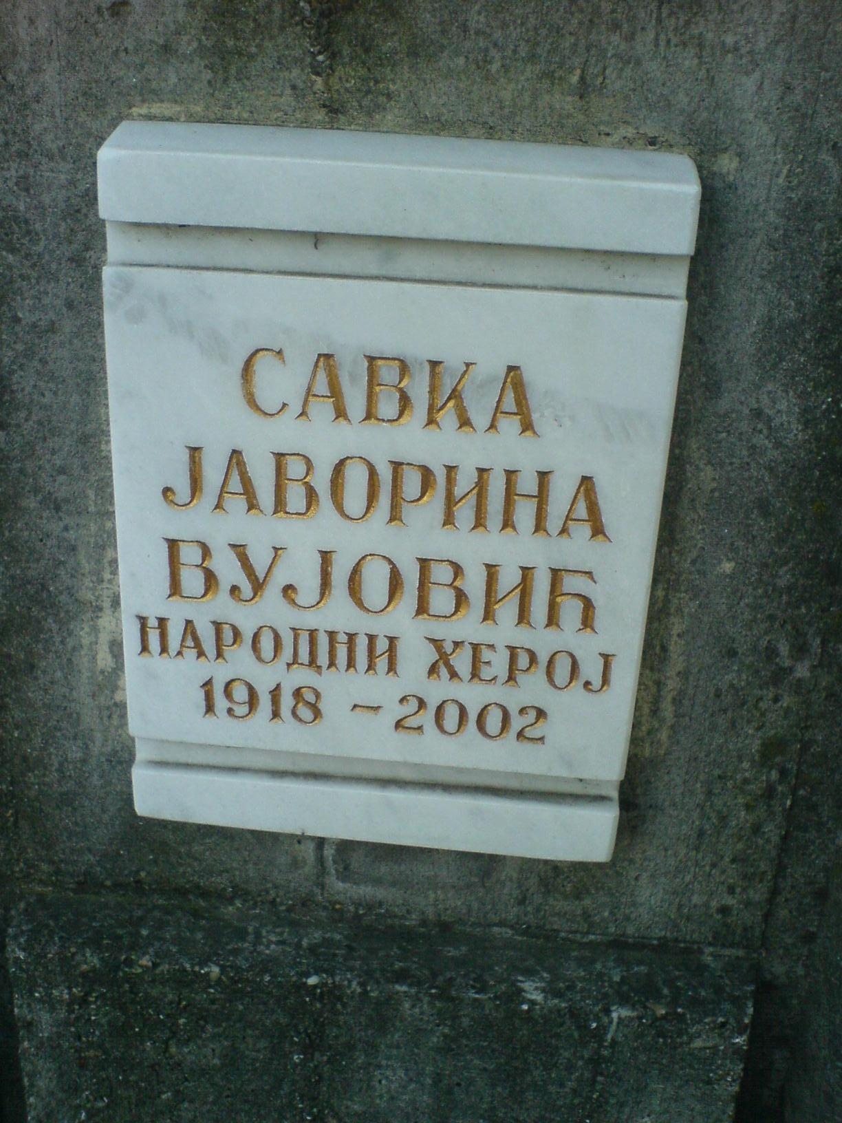 Grob Saše Javorine.